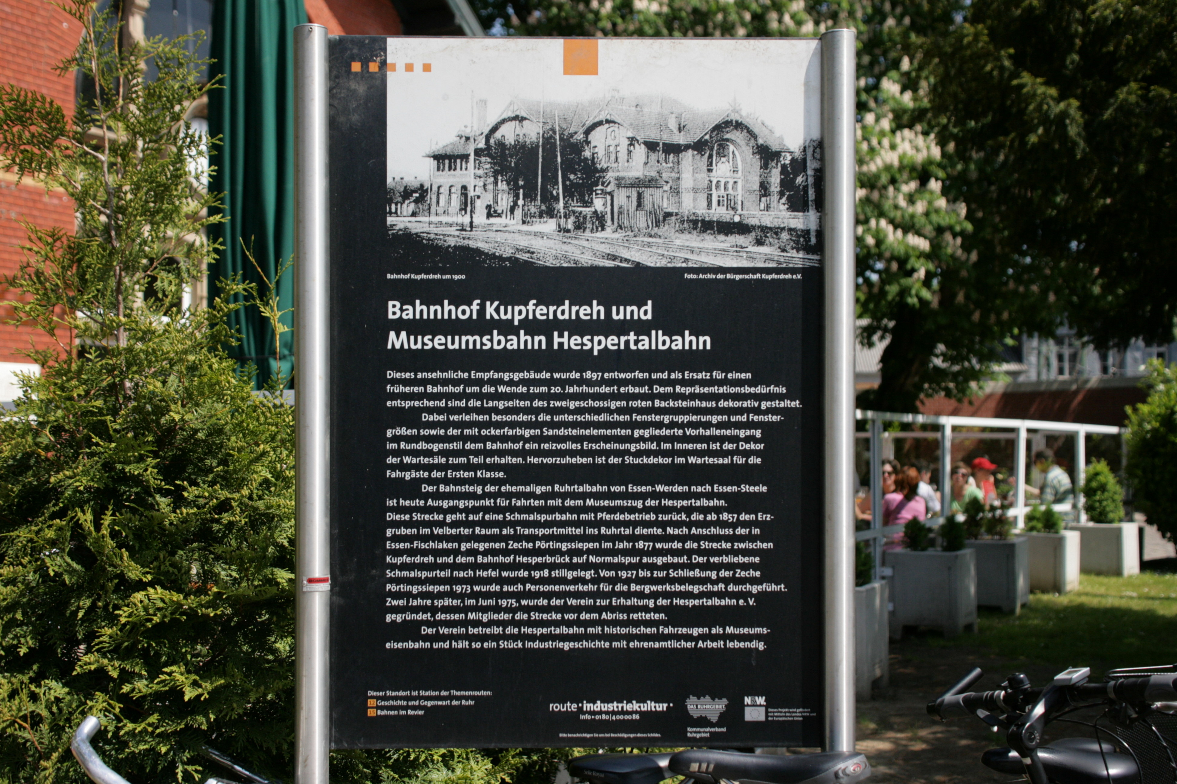 Alter Bahnhof der Ruhrtalbahn/Hespertalbahn, Prinz-Friedrich-Straße 1 in Essen-Kupferdreh